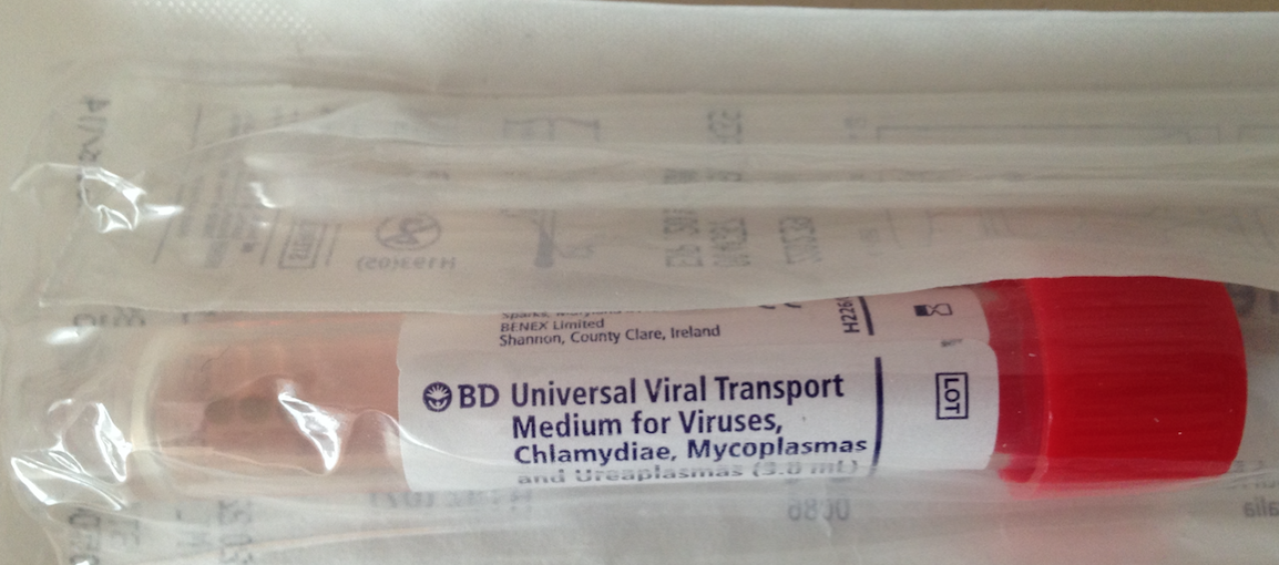 Medium transmissionis materiae contagiosae